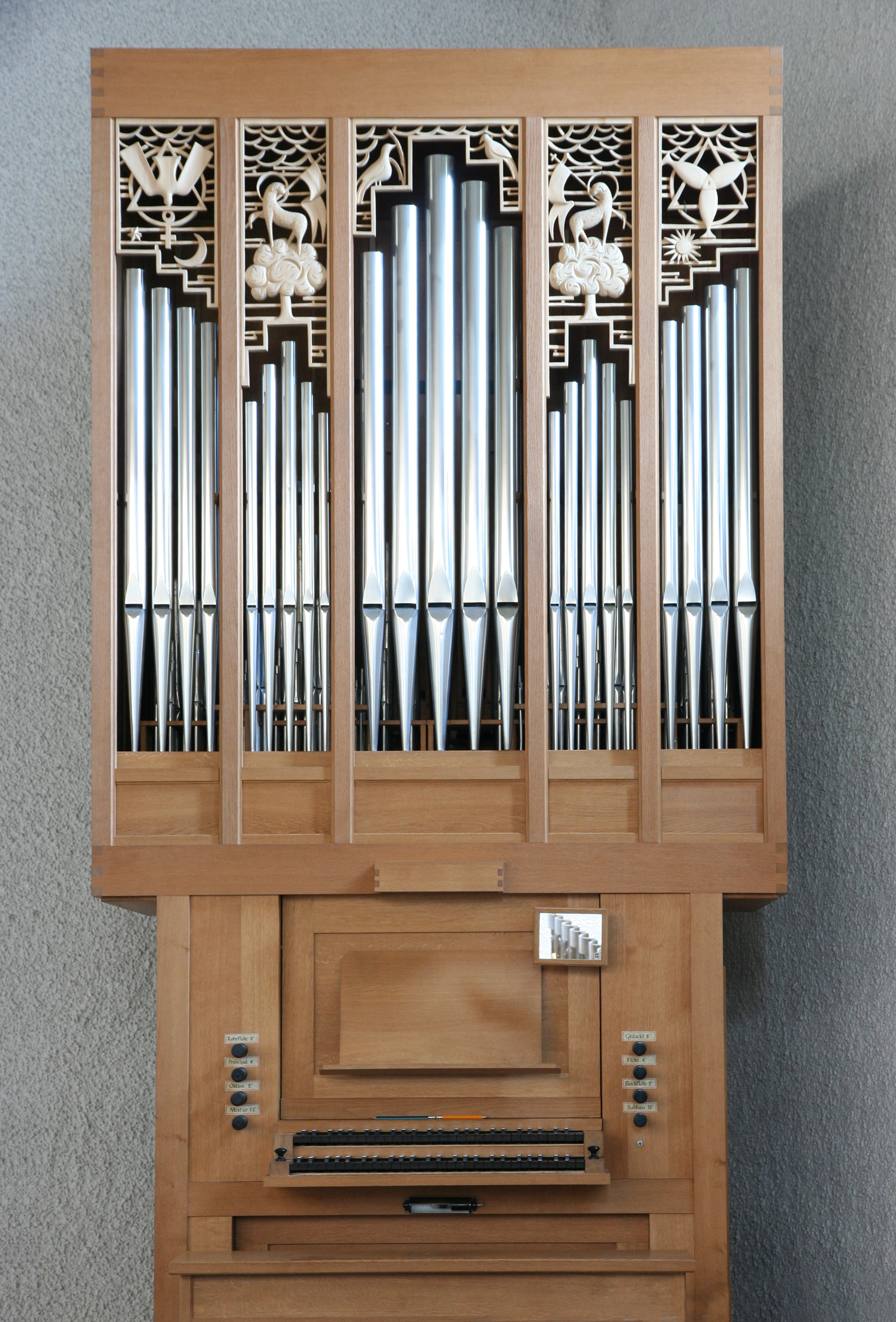 Röm.-kath. Kirche St. Josef in Matzingen